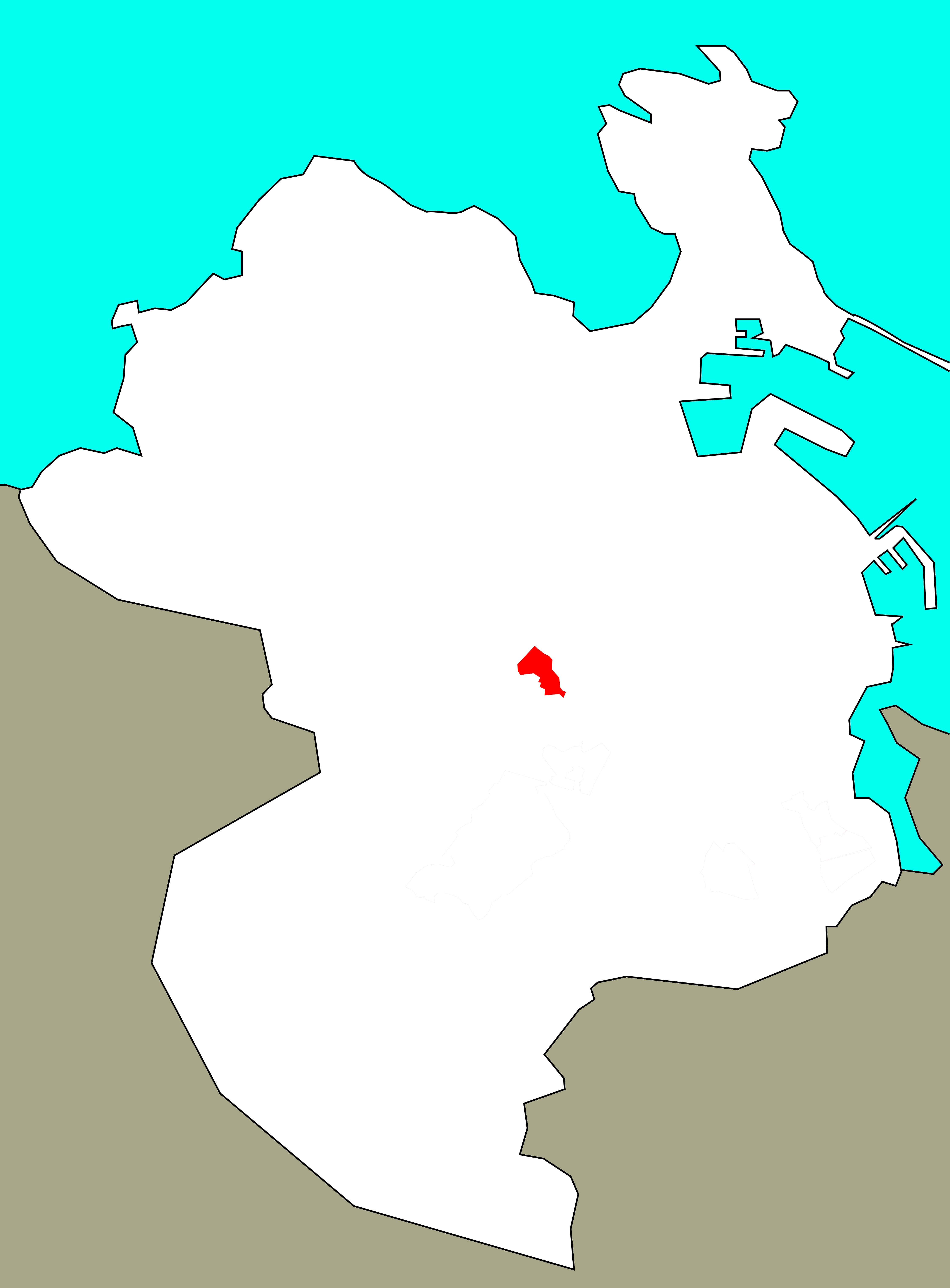 Situación de San Cristovo das Viñas no concello da Coruña.[1]